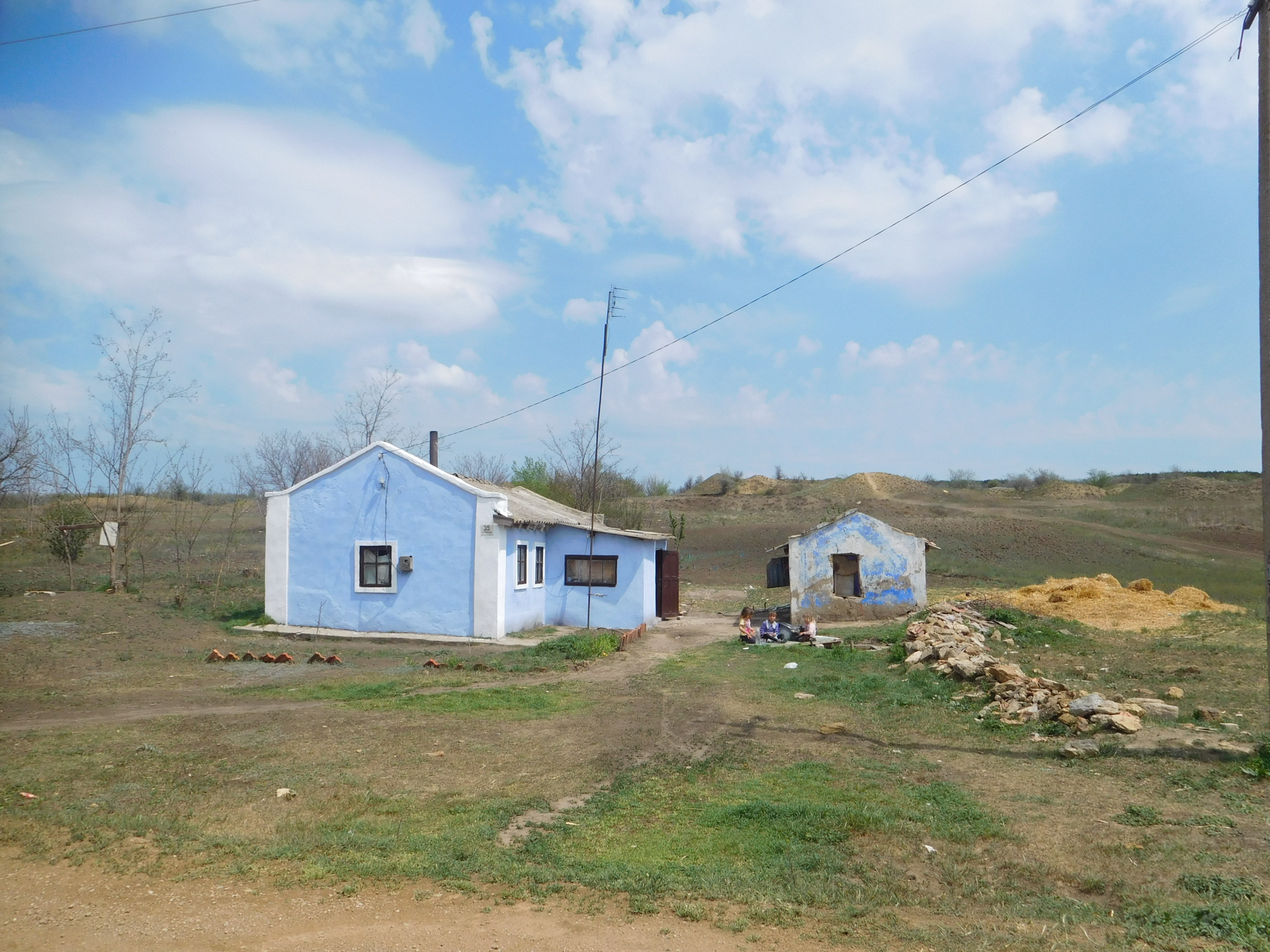 с. Верхній Куяльник, Одеська область